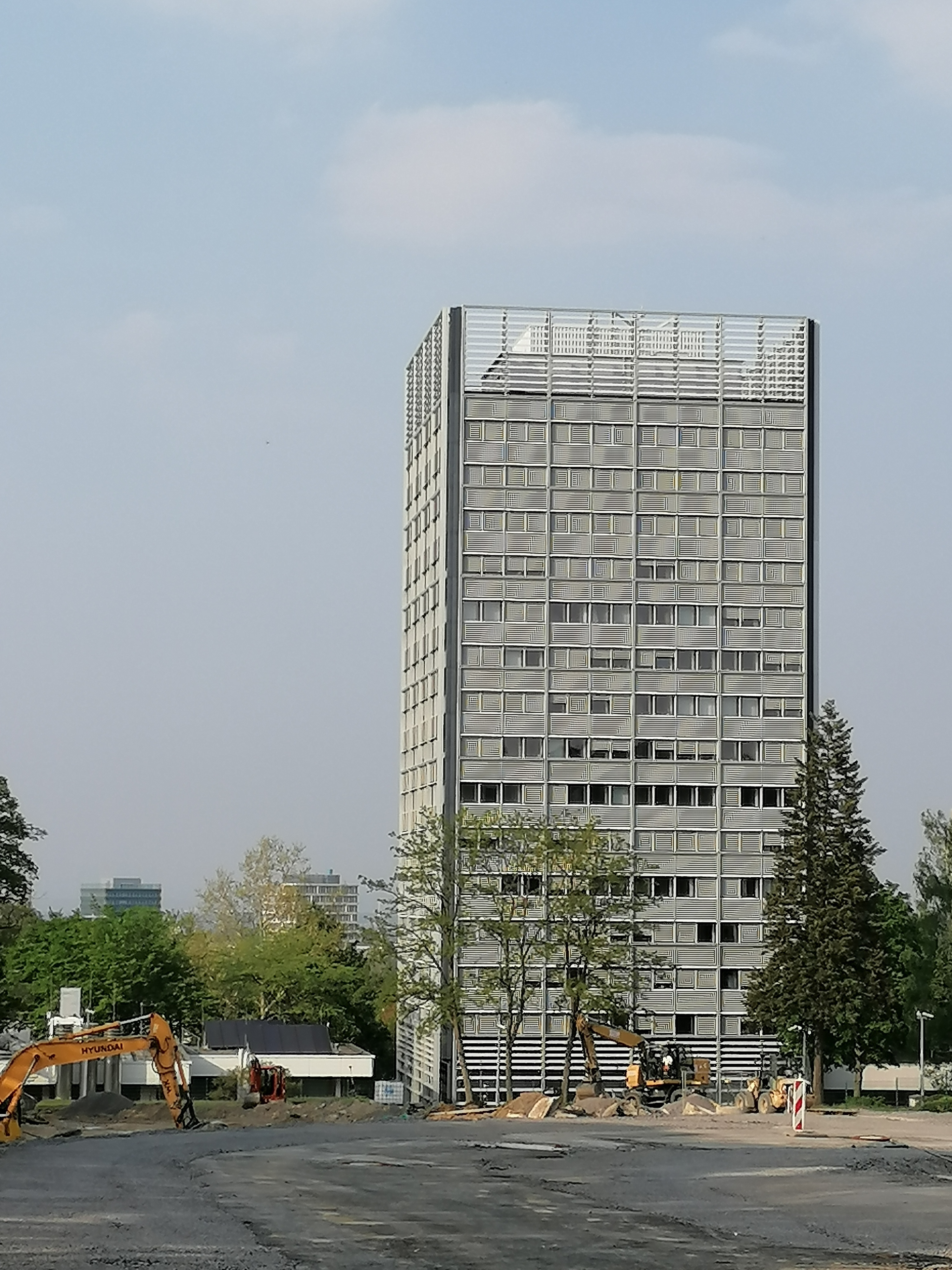 Das Hochhaus des Bundesministeriums für Wirtschaft und Energie (BMWi) in Bonn-Hardtberg